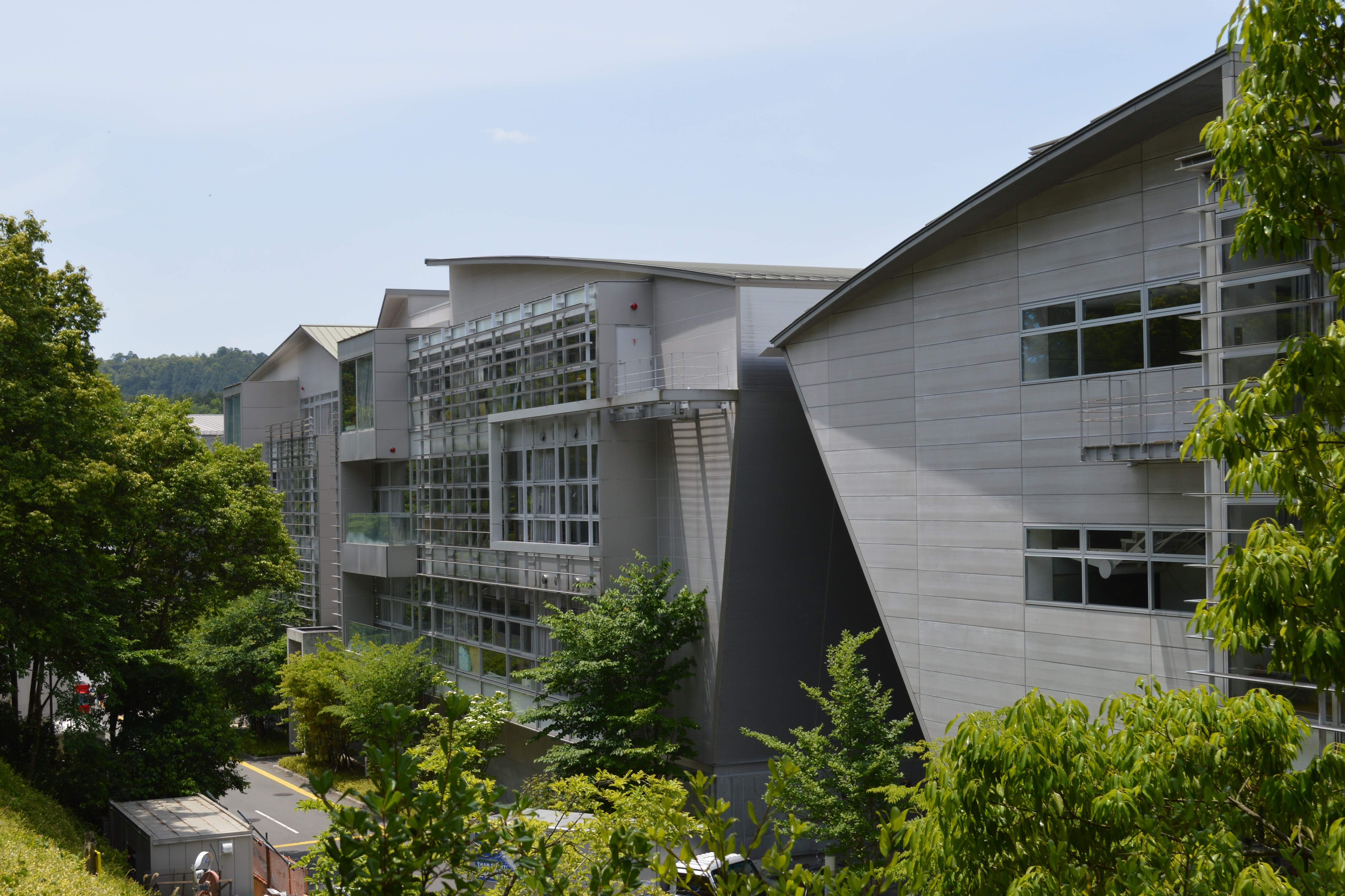 京都市左京区岩倉 京都精華大学 春秋館付近から見た自在館（右）と対峰館（中央）